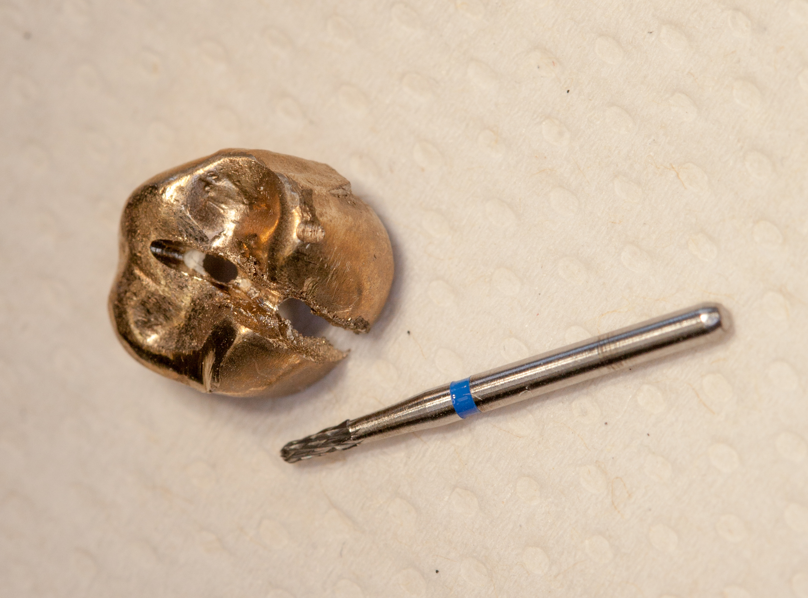 Entfernung einer Krone, mit Hartmetallbohrer aufgeschlitzter Goldzahn